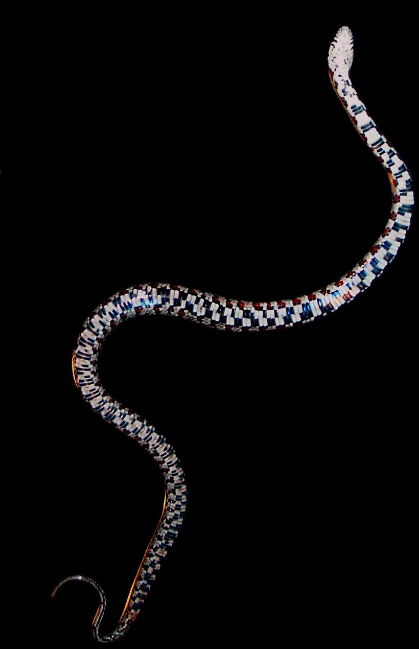 Bauchseite einer juvenilen Kornnatter (Pantherophis guttatus)